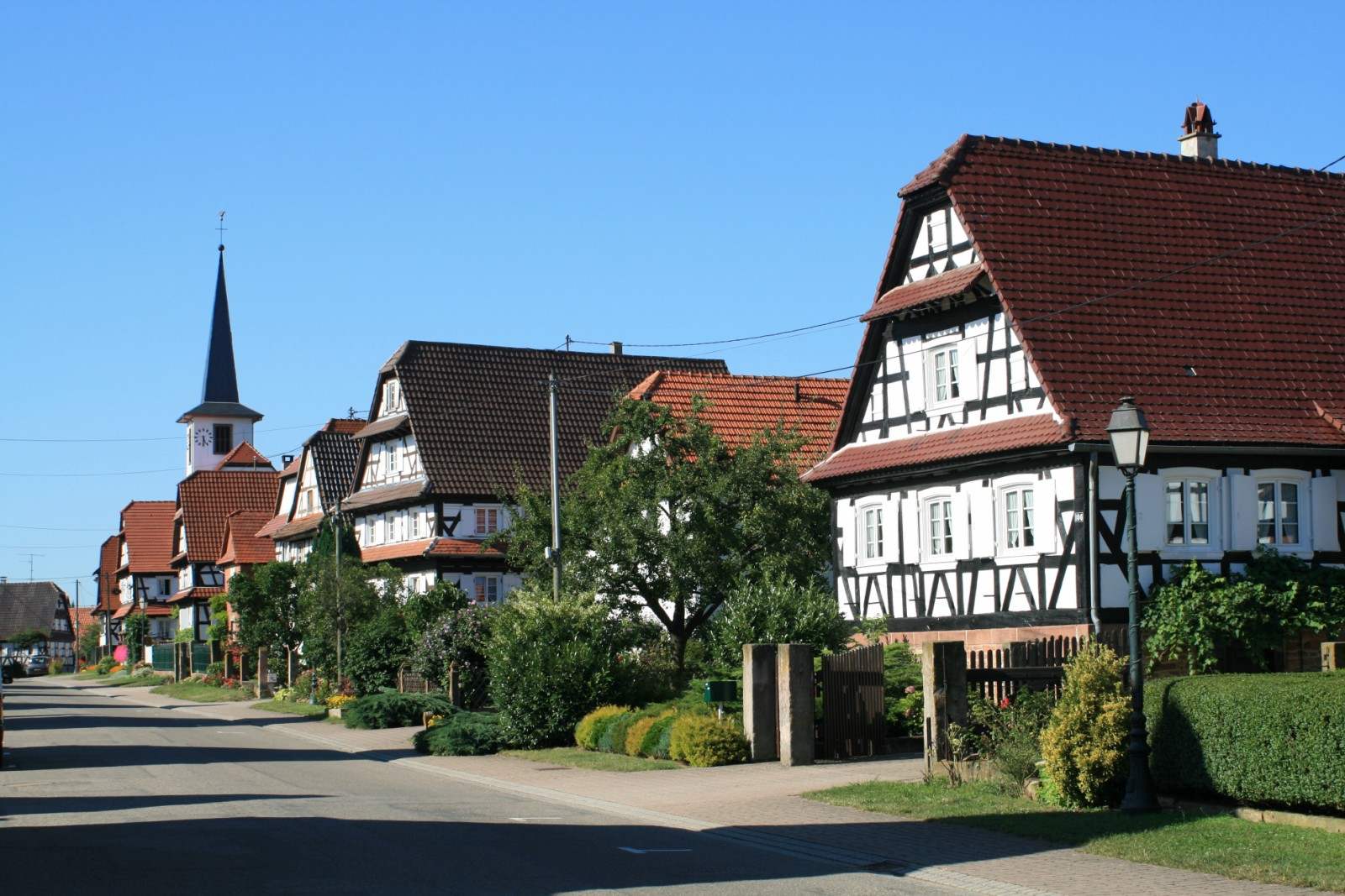 Seebach